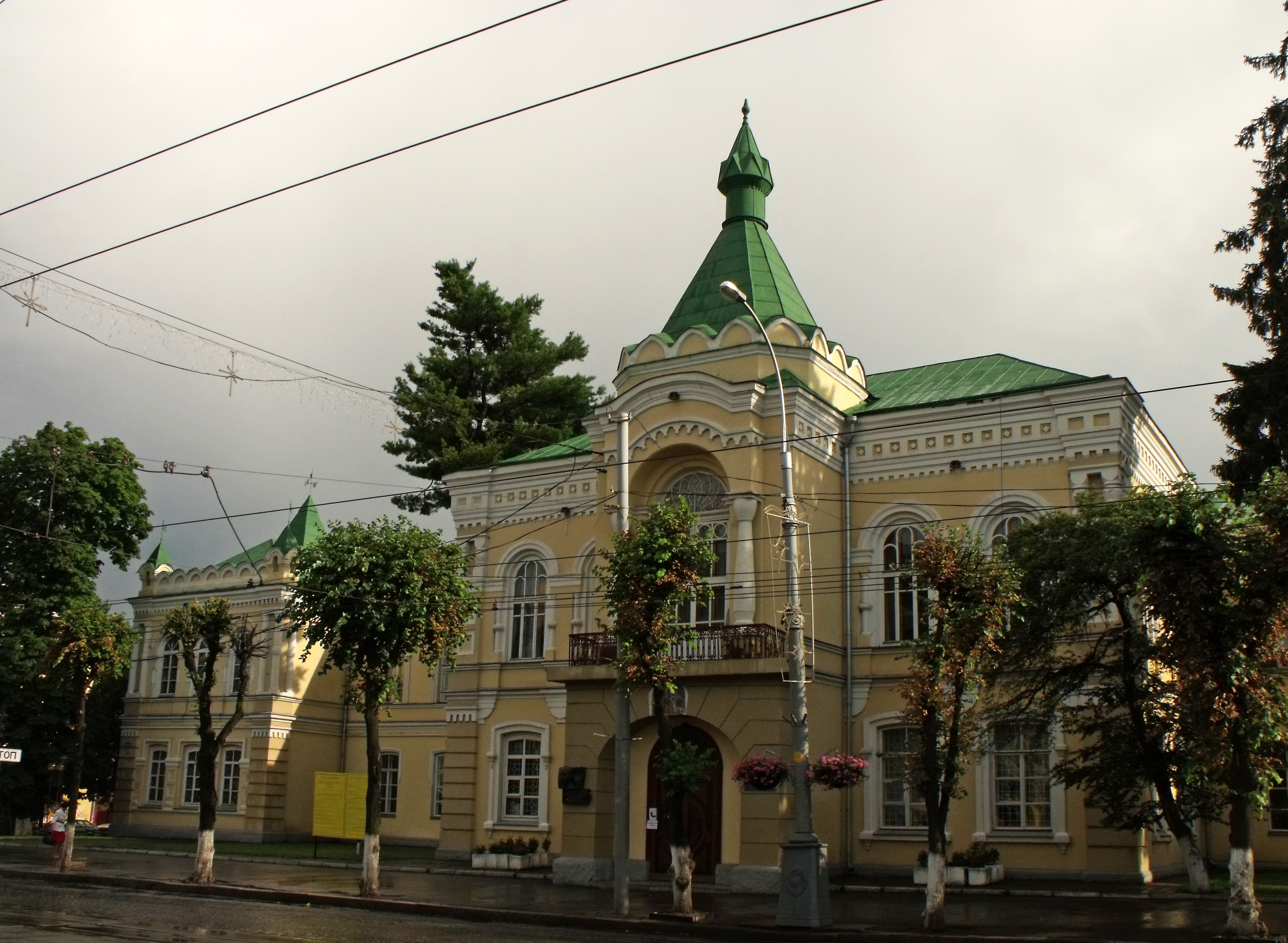 Будинок реального училища, Вінниця, вул. Соборна, 87/18